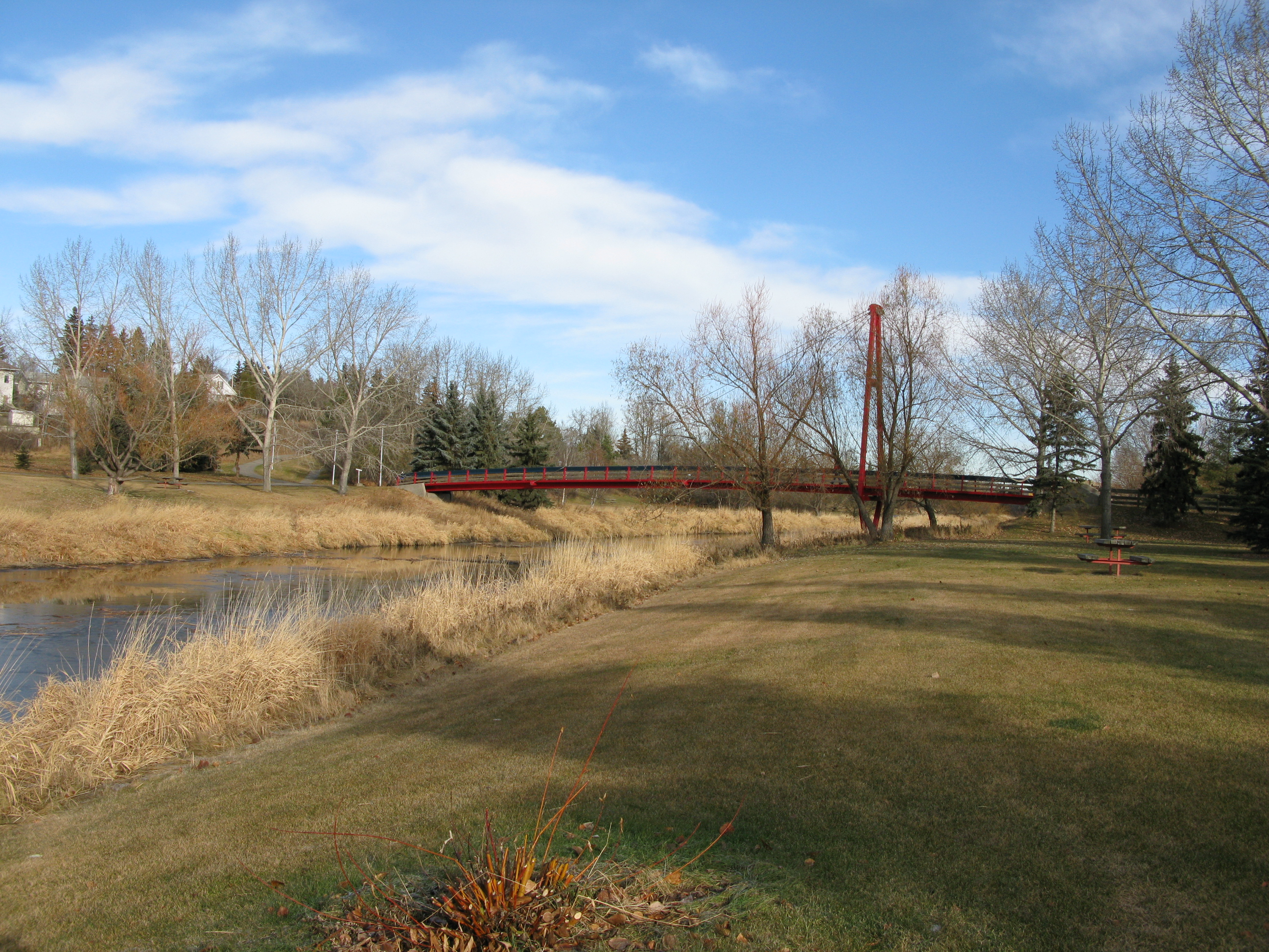 Sturgeonriverstalbert2